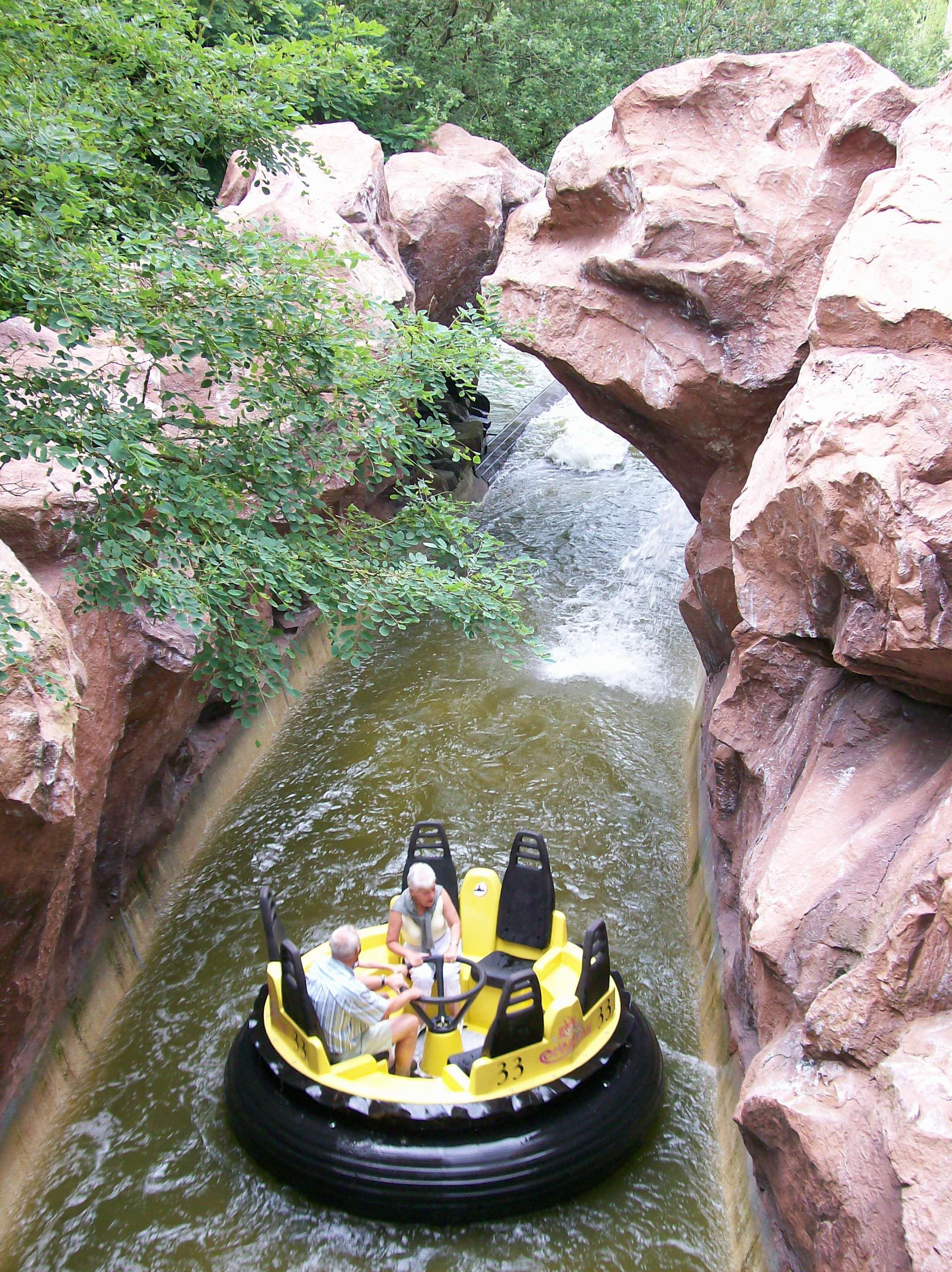 L'attraction Piraña